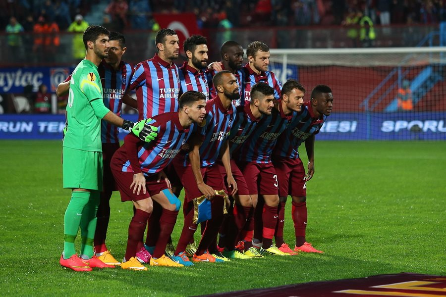 28 Kasım 2014 tarihinde, Metalist ile oynanan maçta Trabzonspor kadrosu.